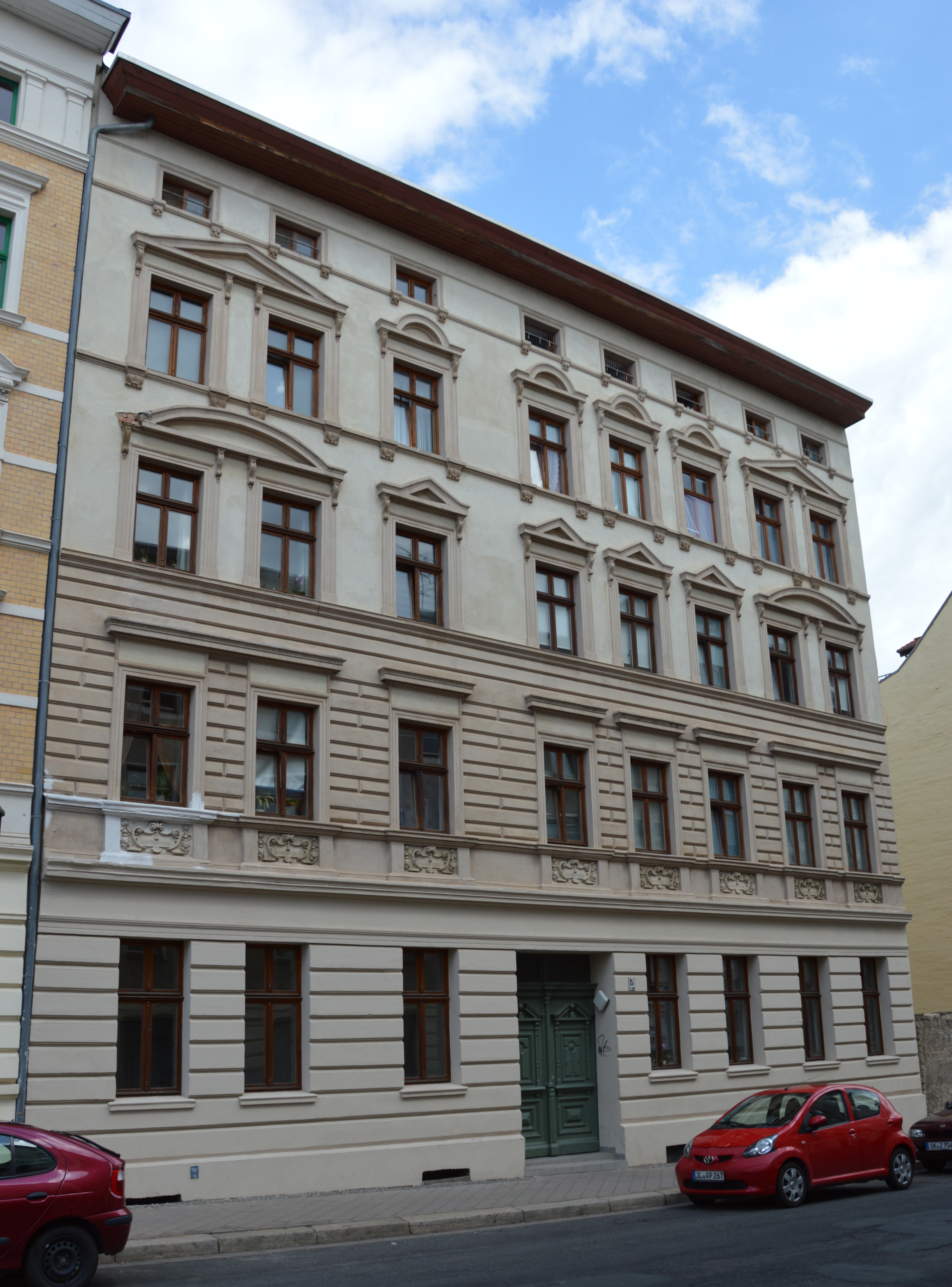 Wohnhaus St.-Michael-Straße 5 in Magdeburg